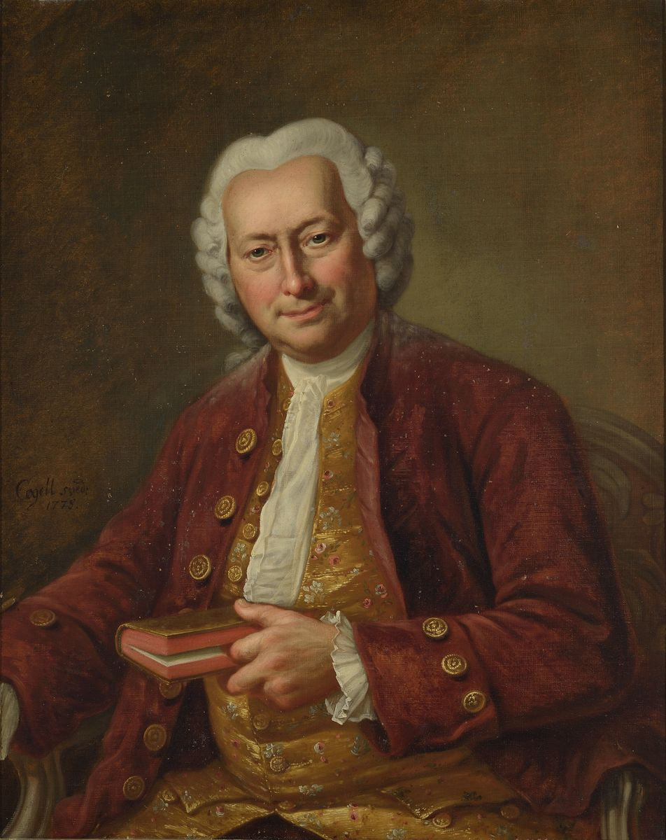 Claude Jacob, par Pierre Cogell (1734-1812)